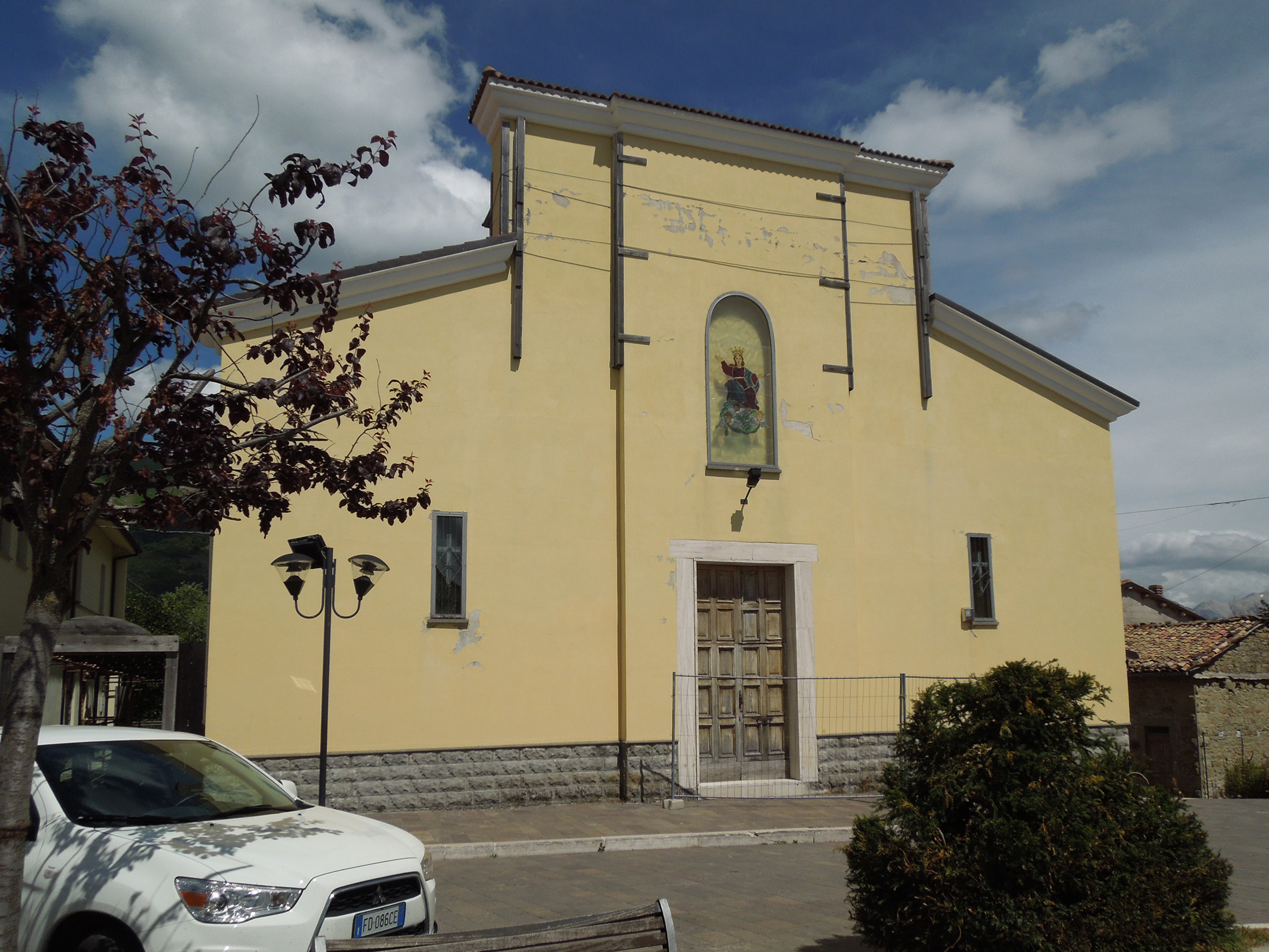 Chiesa di Santa Maria Assunta di Campotosto in provincia dell'Aquila, esterno giorno, luglio 2016.